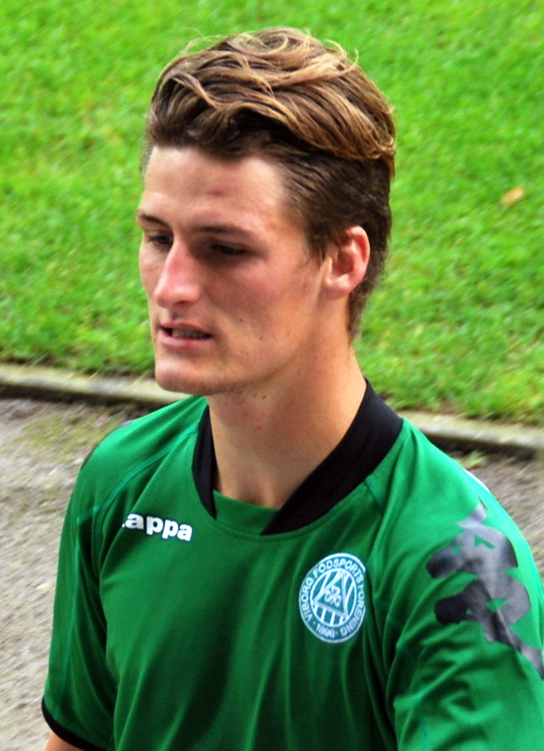 Fodboldspilleren Dennis Høegh fra Viborg FF. Her efter 1. divisionskampen mod FC Roskilde på Viborg Stadion.